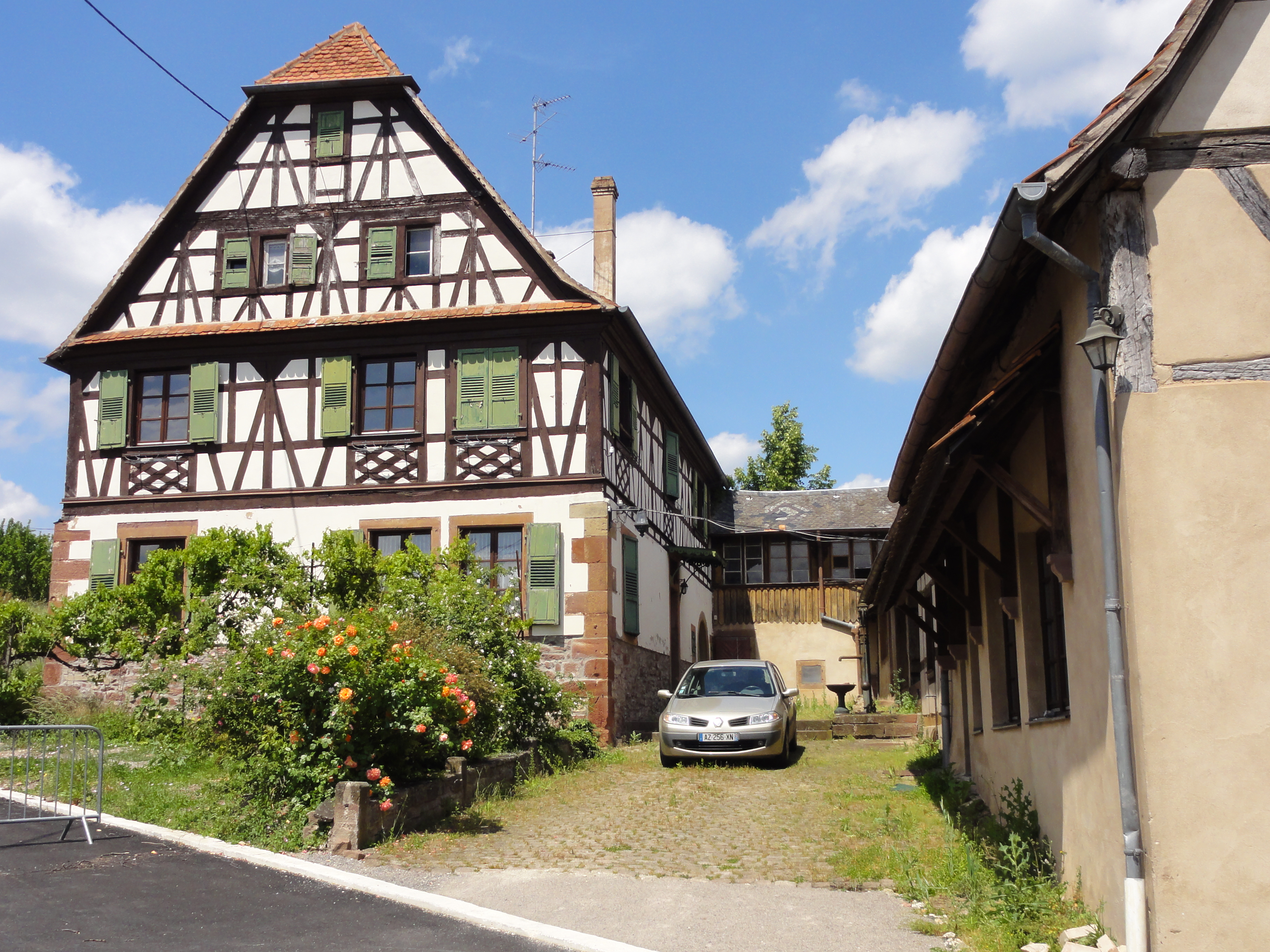 Alsace, Bas-Rhin, Balbronn, Presbytère protestant (1732, 173 rue du Fossé. .